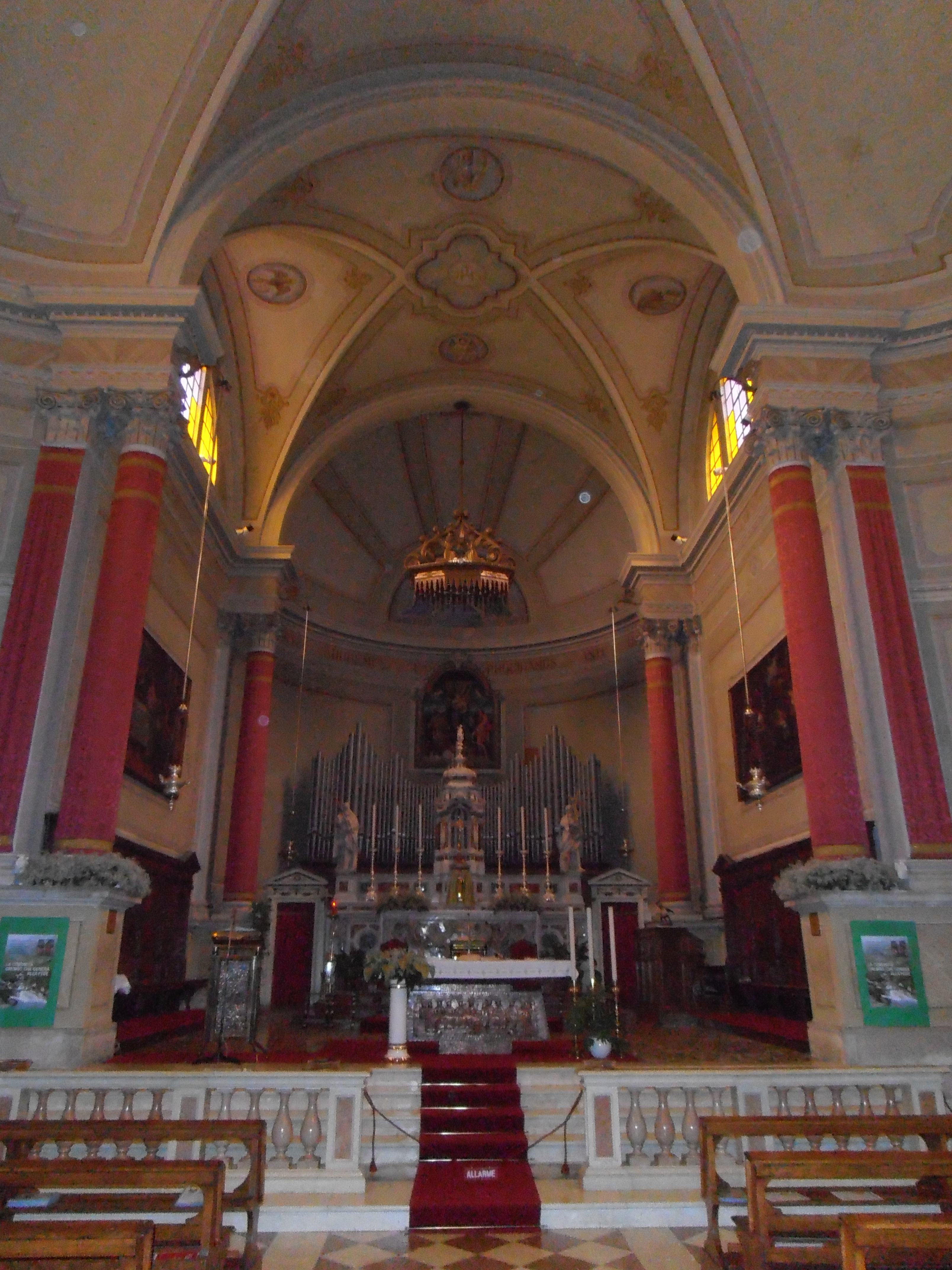 Borso del Grappa (Italie) Intérieur de l'église